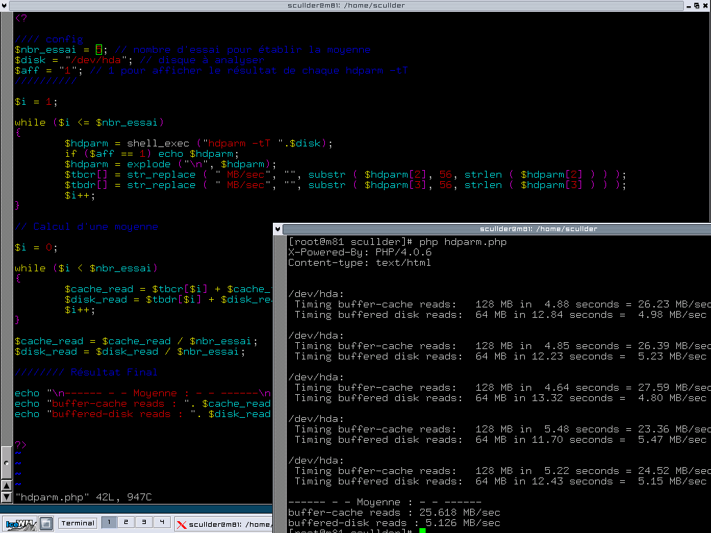 Capture d'écran de vim en fond, affichant un script PHP, et à droite le résultat du script, interprété par PHP. Cette capture d'écran a été réalisée de Linux sous IceWM.